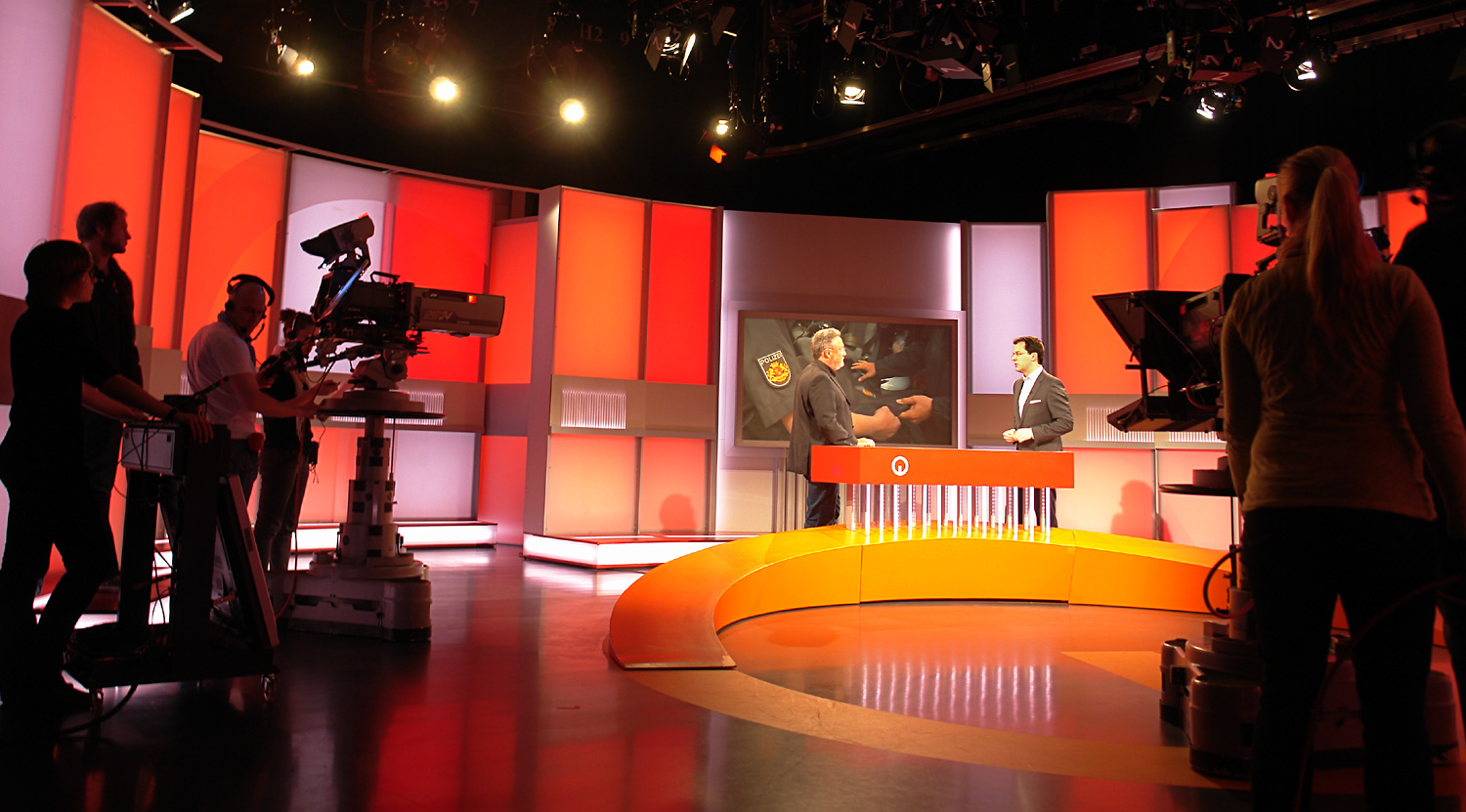 Radio Bremen in Bremen, Weserhaus. Nachrichten-Mann Frank Schulte (rechts am Sprecherpult) in „buten un binnen um 6“